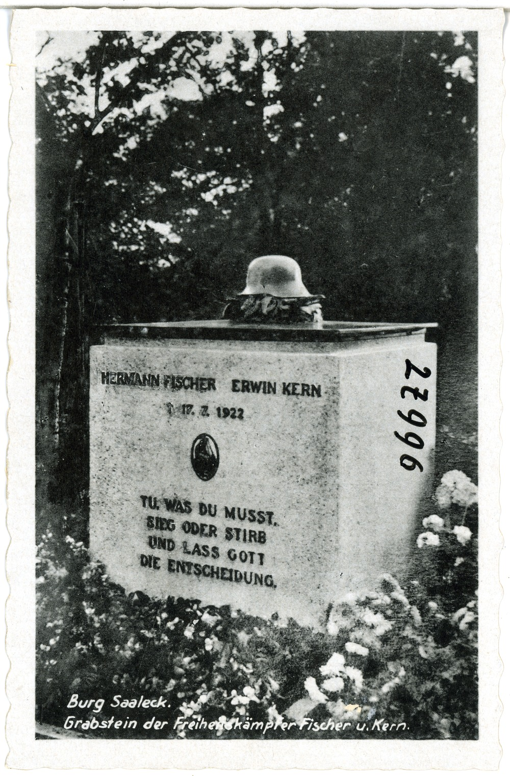 Saaleck; Gedächtnisstein für Fischer und Kern This postcard is from publisher Brück & Sohn in Meißen ( postcard has a unique number 27996 and is available in a higher resolution at the publisher. This images was uploaded in a cooperation project between Wikipedians and the publisher.